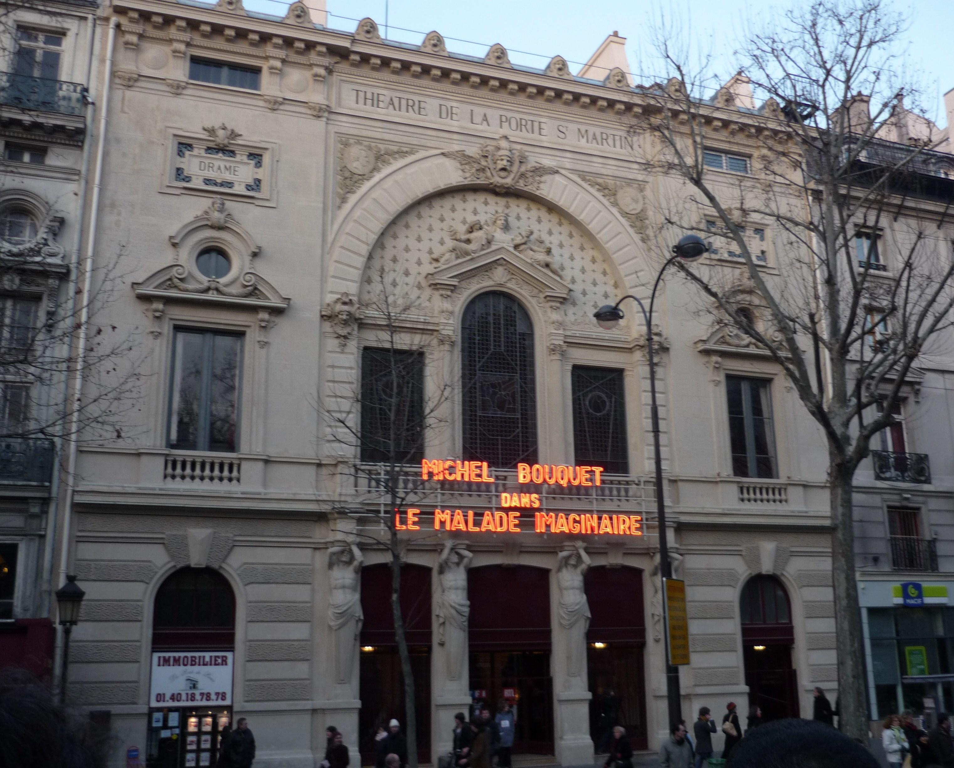 Le Théâtre de la Porte-Saint-Martin en 2009 : « Michel Bouquet dans Le Malade imaginaire »